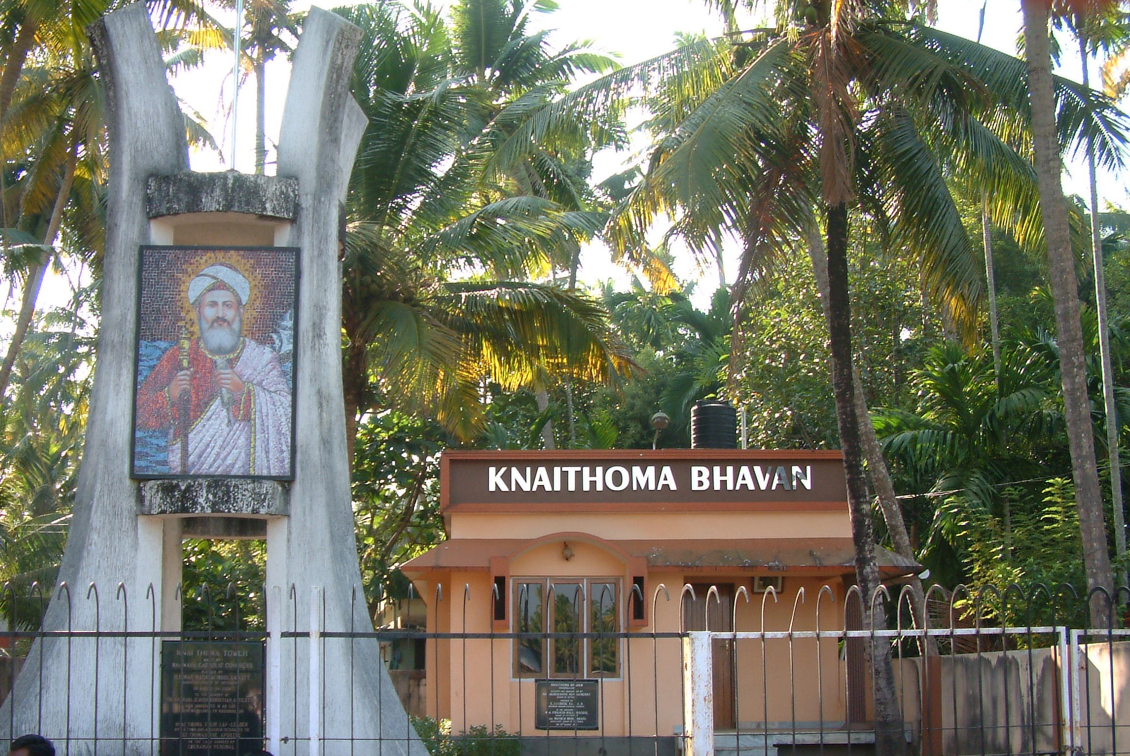 Knaithoma bhavan